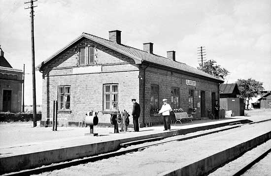 Klagstorp railway station, Trelleborg-Rydsgårds Järnväg, Sweden